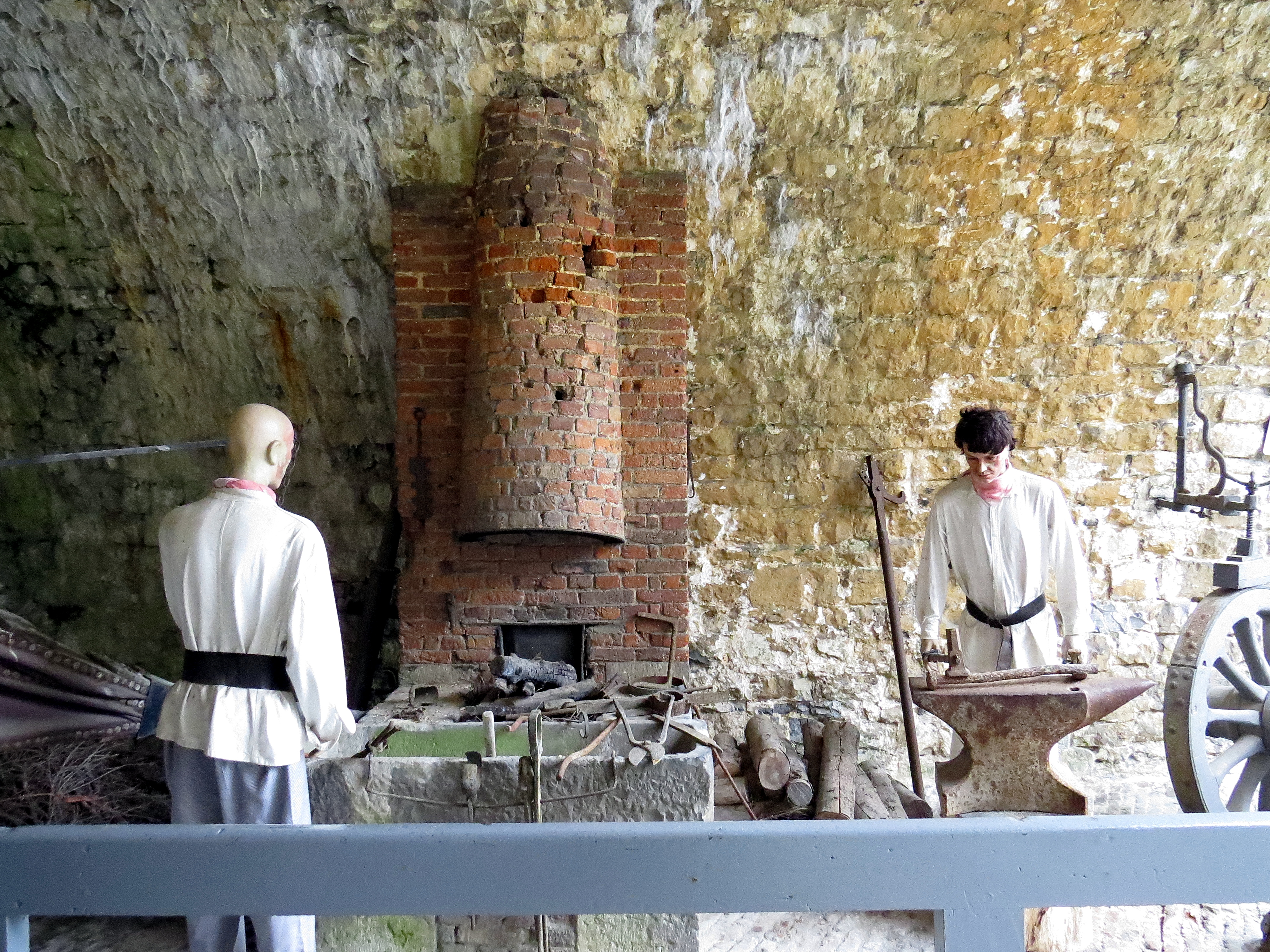 Festung Dinant, Schmiedewerkstatt anno 1890